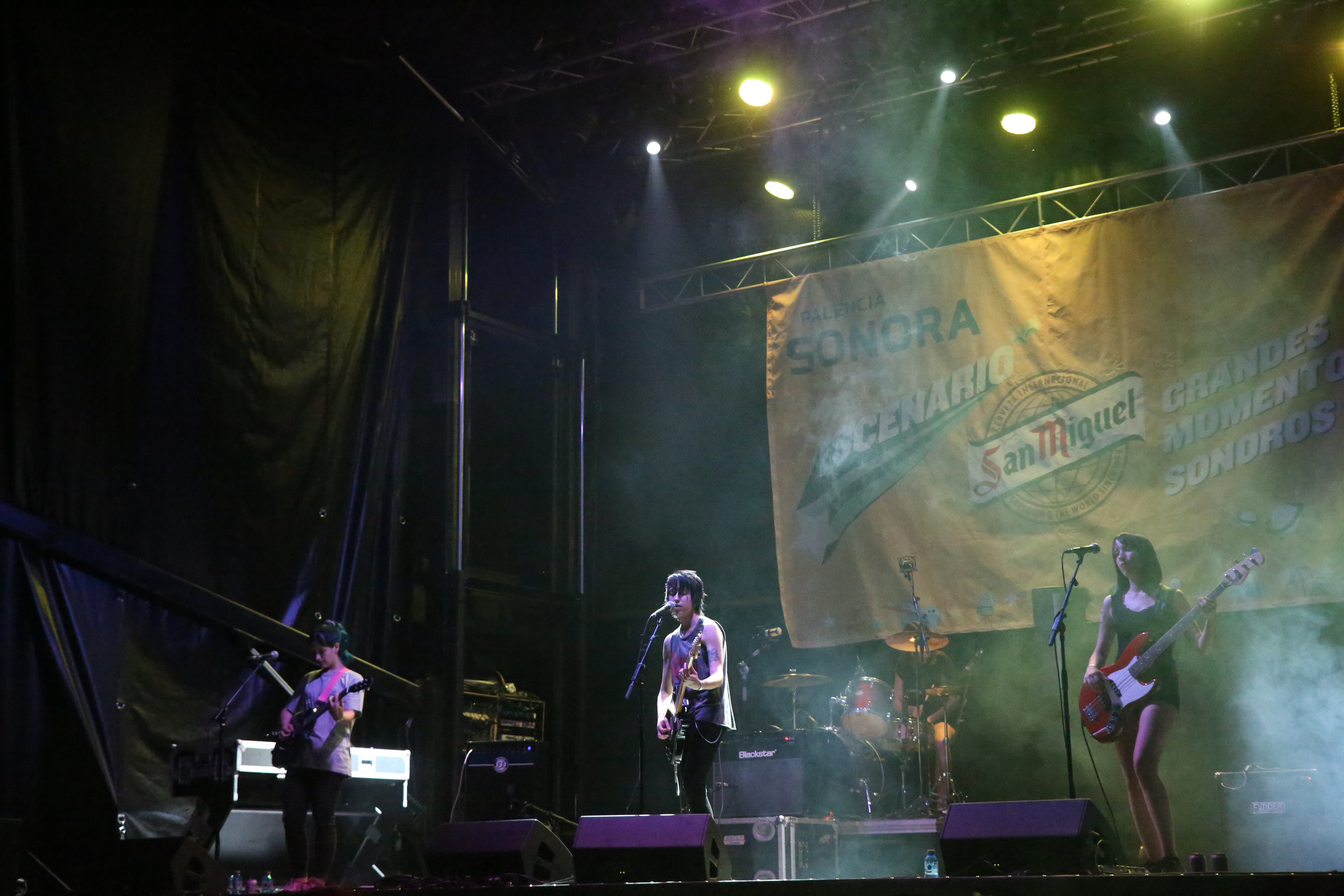 El grupo Estrogenuinas en el festival Palencia Sonora 2017.